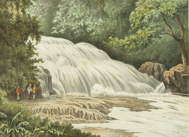 Litho. Litho naar een oorspronkelijke aquarel van J.C. Rappard.. De waterval bij Maros